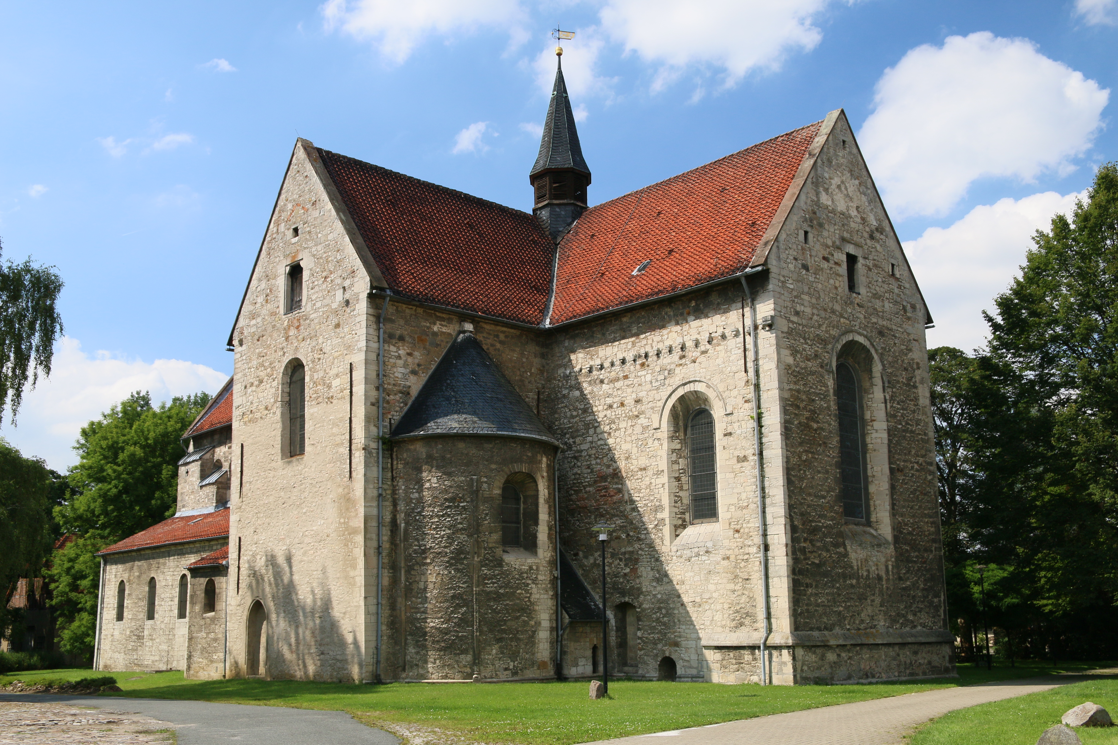 St.-Johannis-Kirche Süpplingenburg, zuerst Stiftskirche, dann zur Kommende der Tempelritter gehörend, später den Johannitern